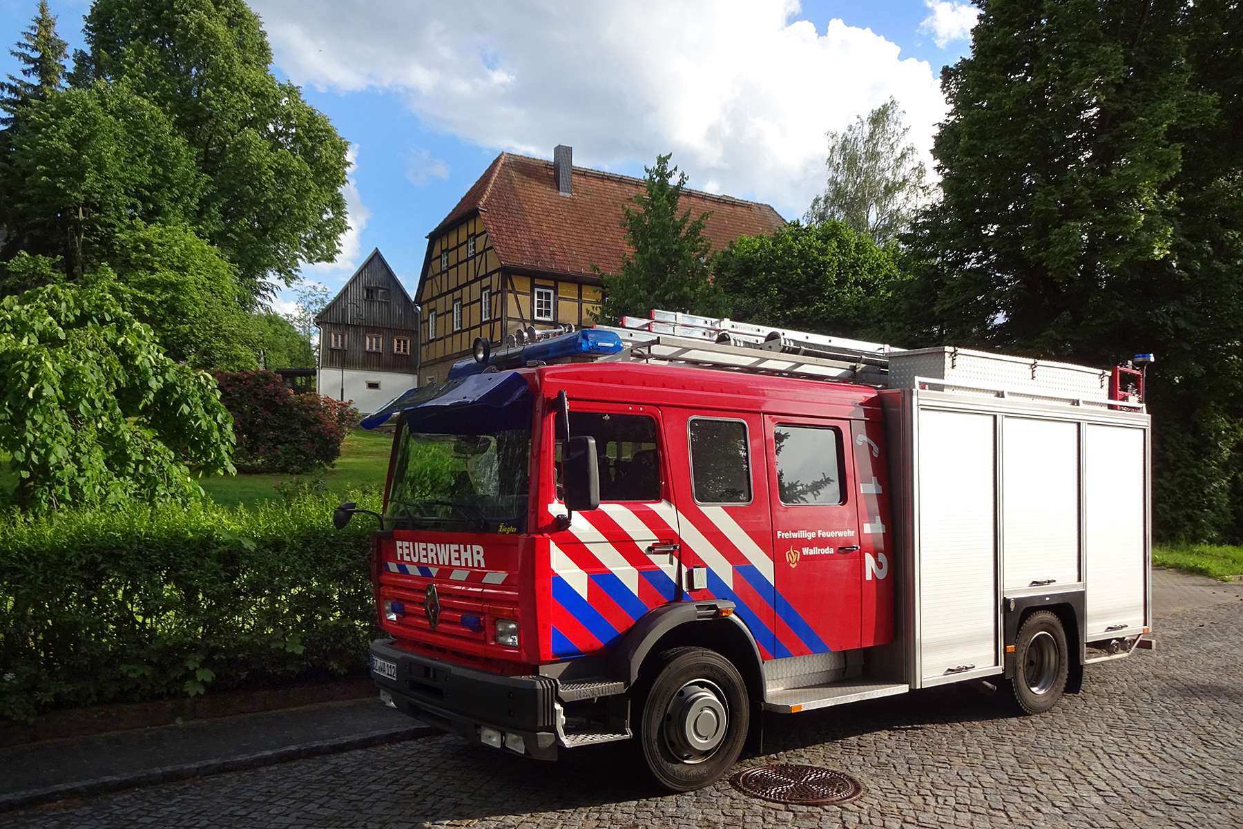 LF 16 der Freiwilligen Feuerwehr Wallroda